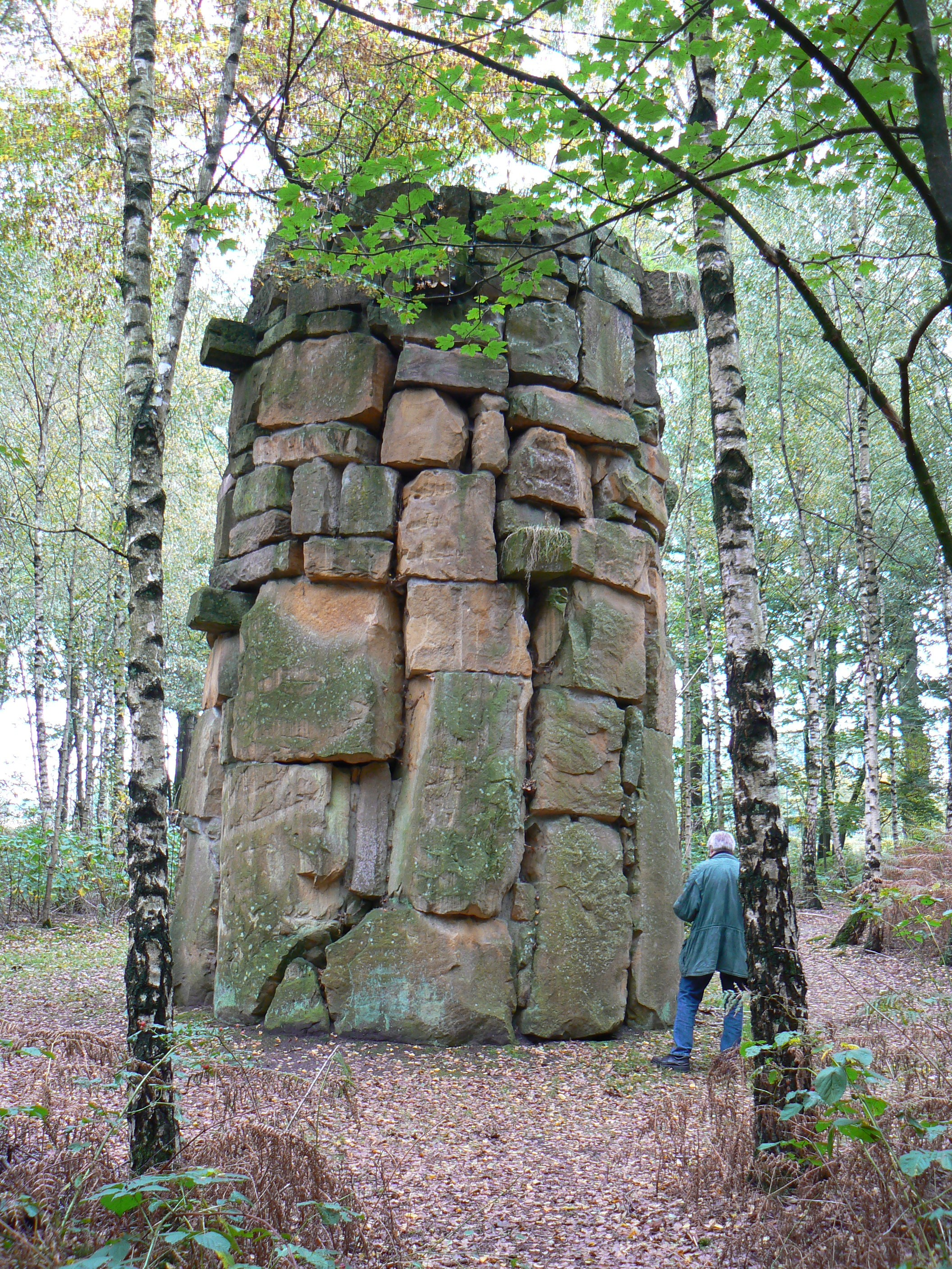 sculpture Der Turm (1982) by Nils-Udo in Frenswegen/Germany